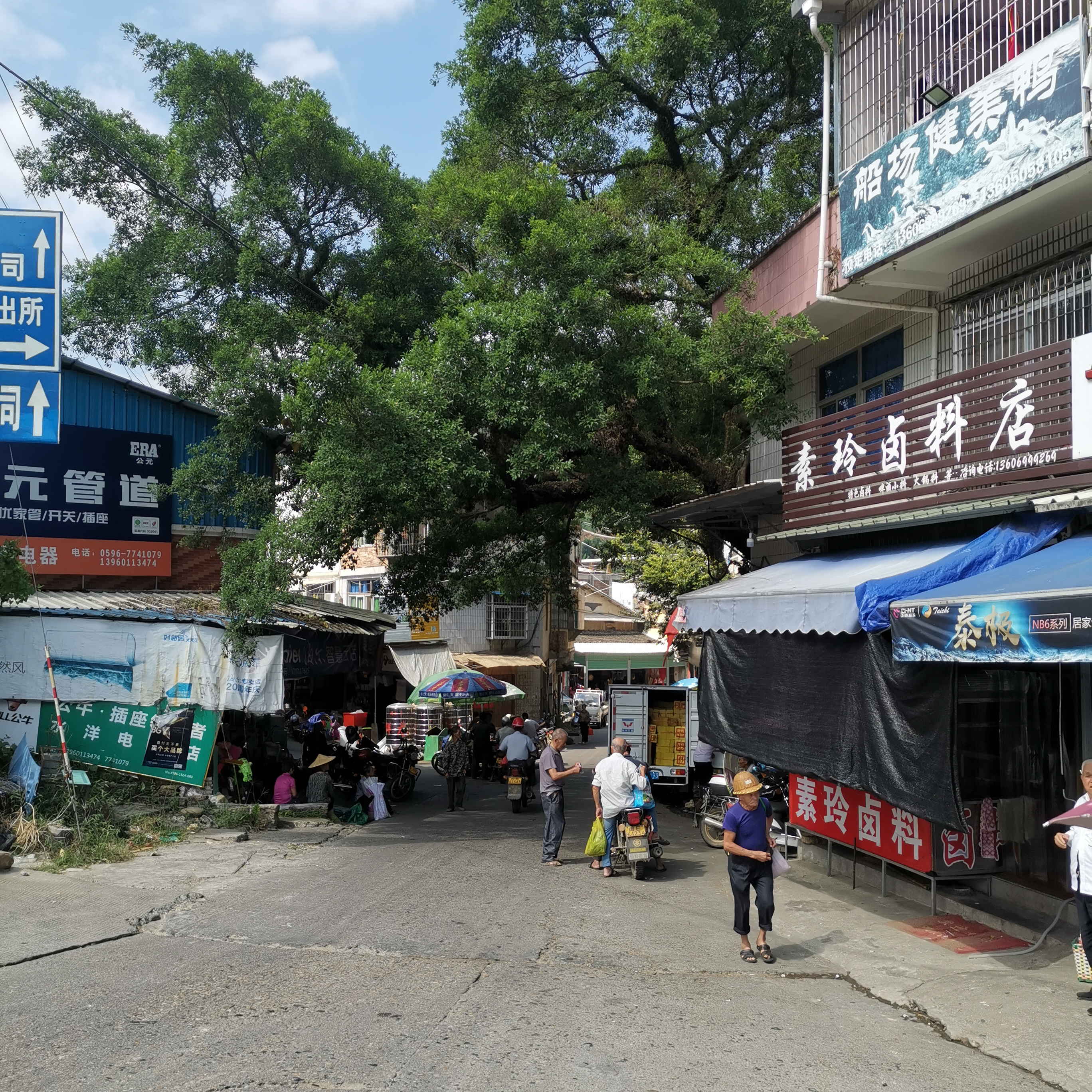 中文（中国大陆）: 漳州南靖县船场镇旧圩